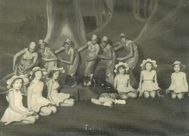 Tutu (1930), johon koreografian teki Helvi Salminen. Tanssikoulujen ja teattereiden yhteistyö.